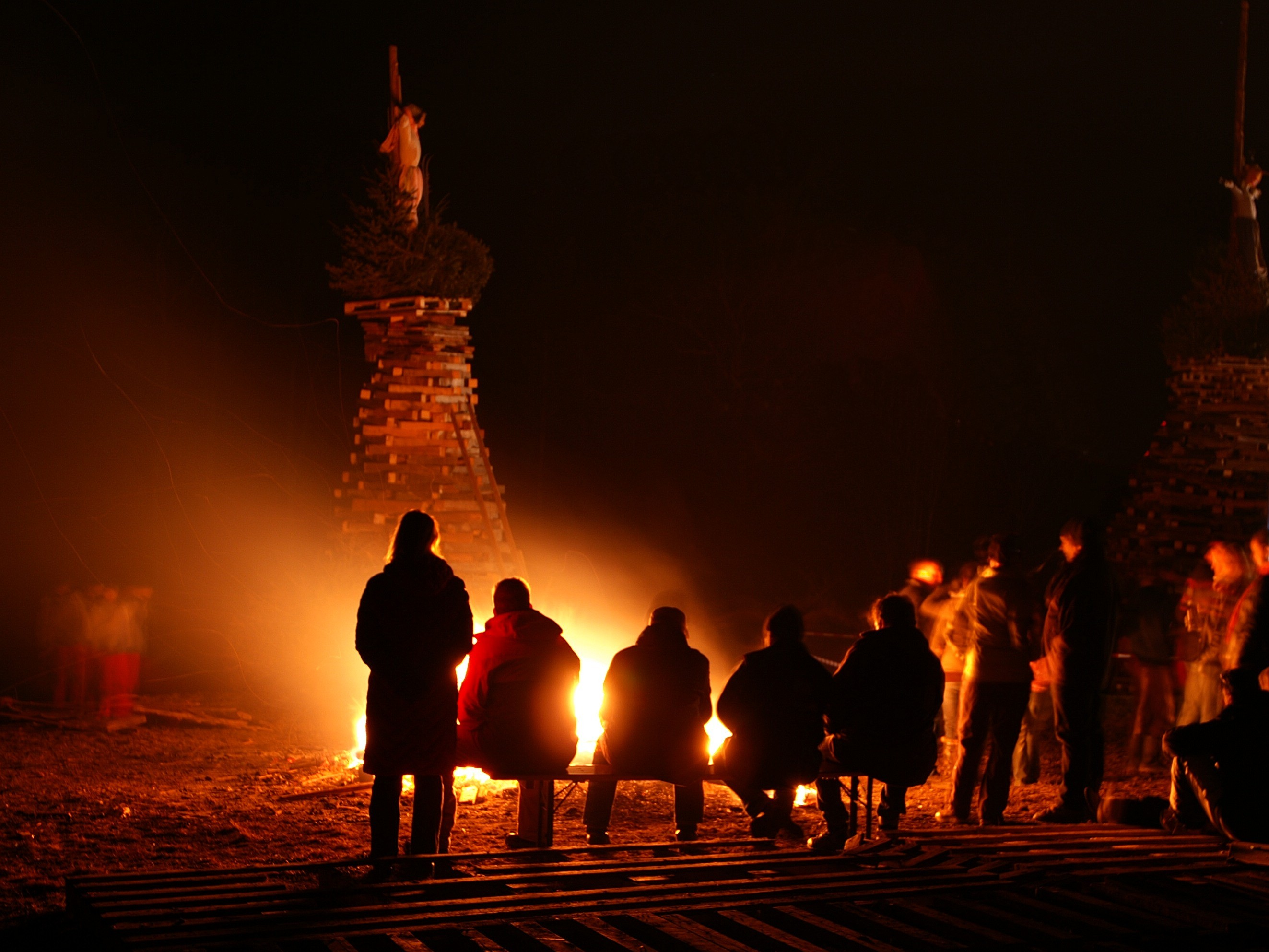 das traditionelle Funkenfeuer am Oberfallenberg in Dornbirn, Vorarlberg.